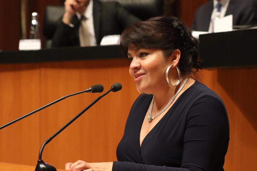 atendiendo la transparencia y mayor difusión de las labores parlamentarias de senadores y senadoras de México.